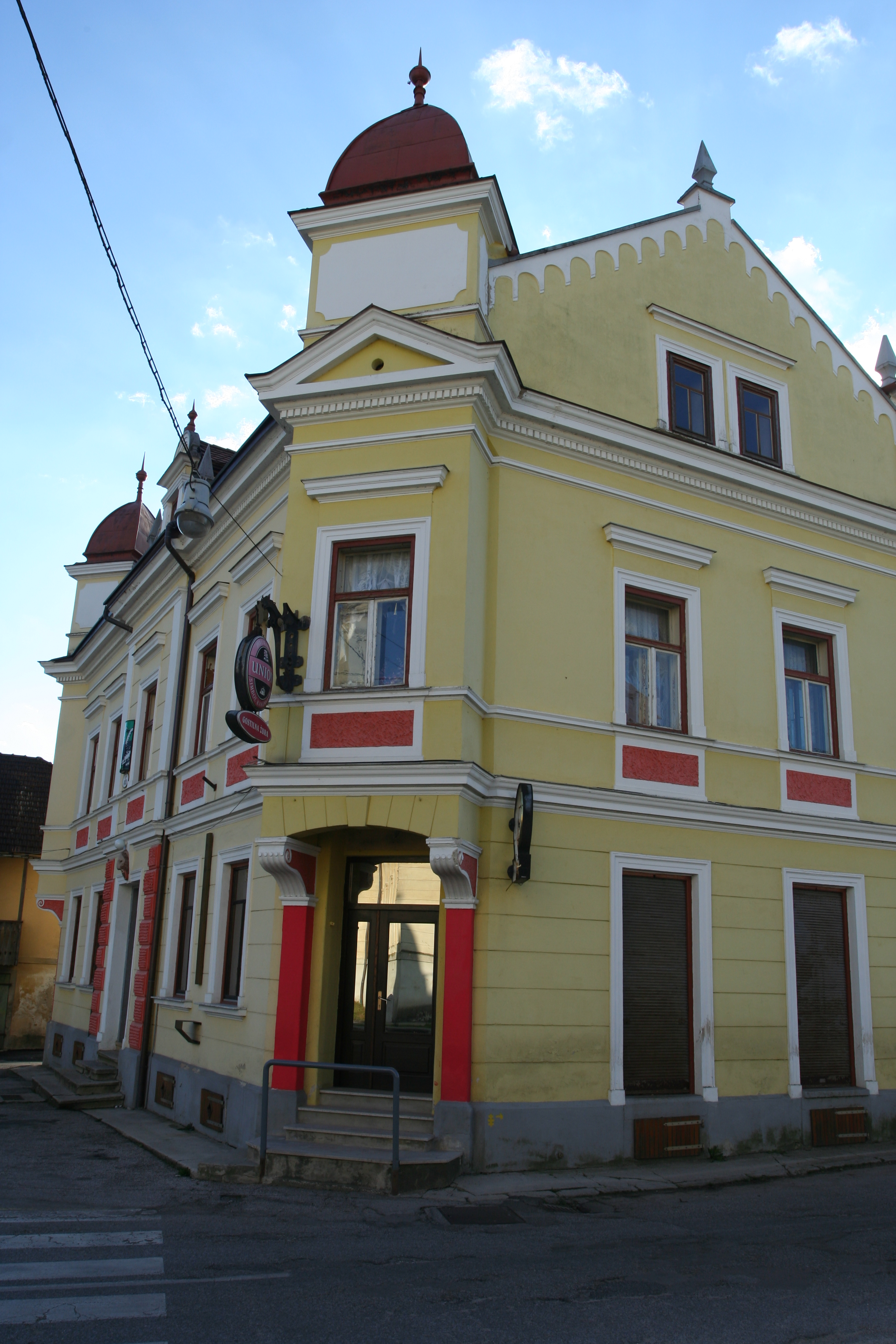 Rojstna hiša Jožeta Karlovška, Šmarjeta